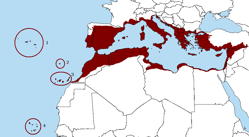 Carte du hotspot Méditerranée - Macaronésie